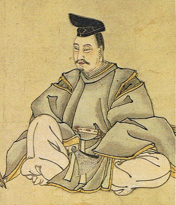 越寺 一山白王院 所蔵の「三衡画像」より、藤原基衡